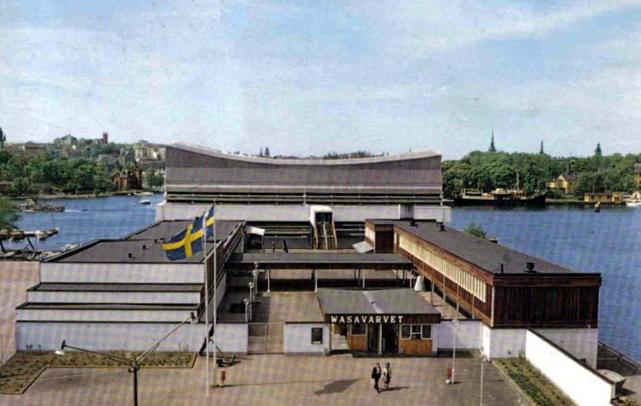 Vasavarvet.